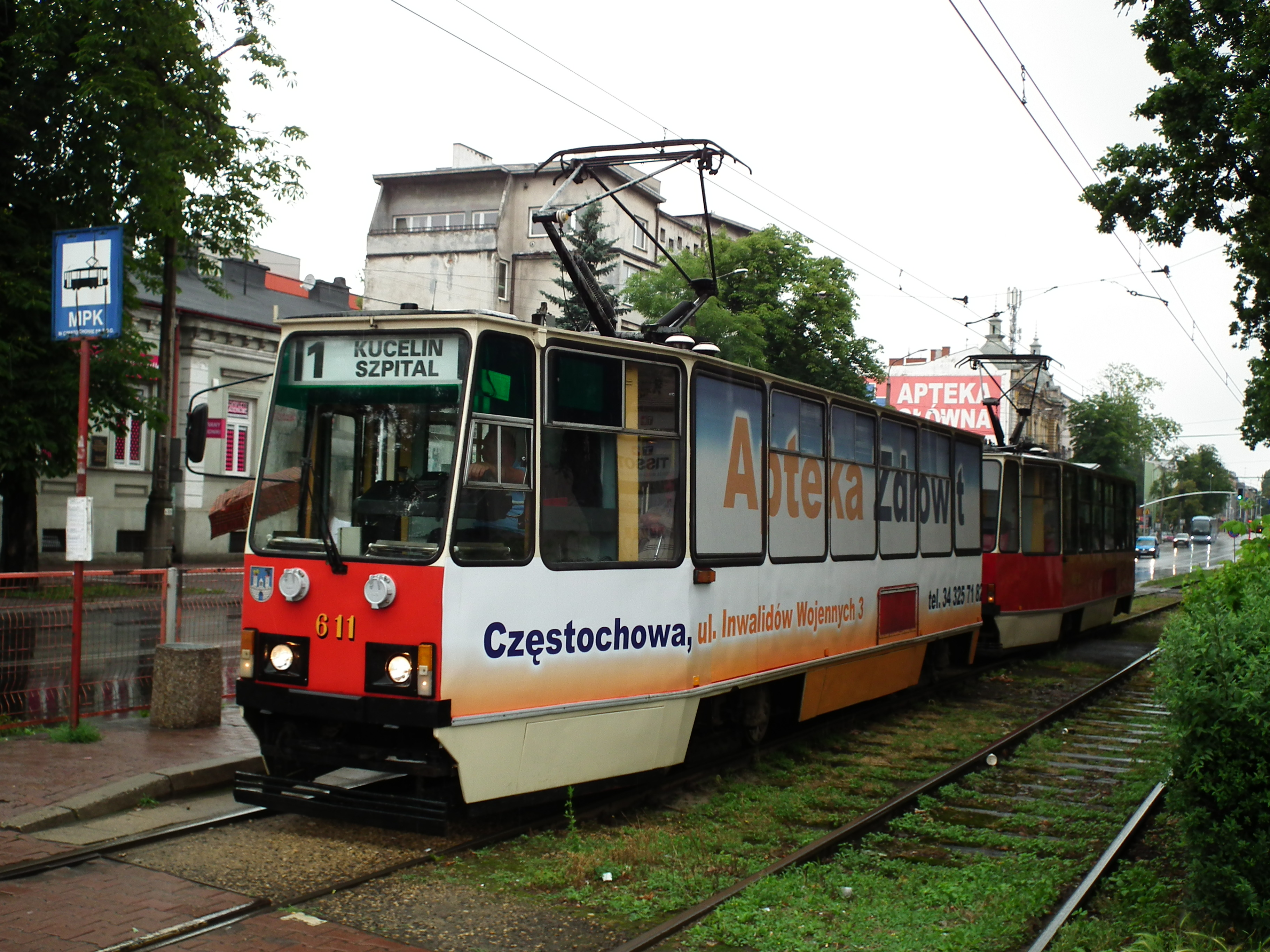 Tramwaj typu 105Na w Częstochowie, przy dworcu kolejowym.